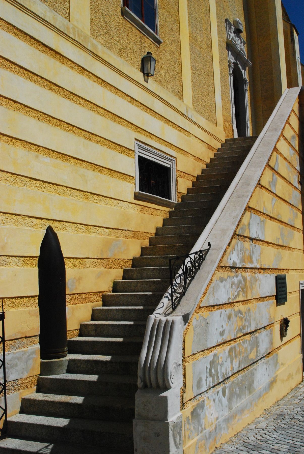 Treppenaufgang zu den im ersten Stock gelegenen Räumlichkeiten des Rathauses von Retz in Niederösterreich.